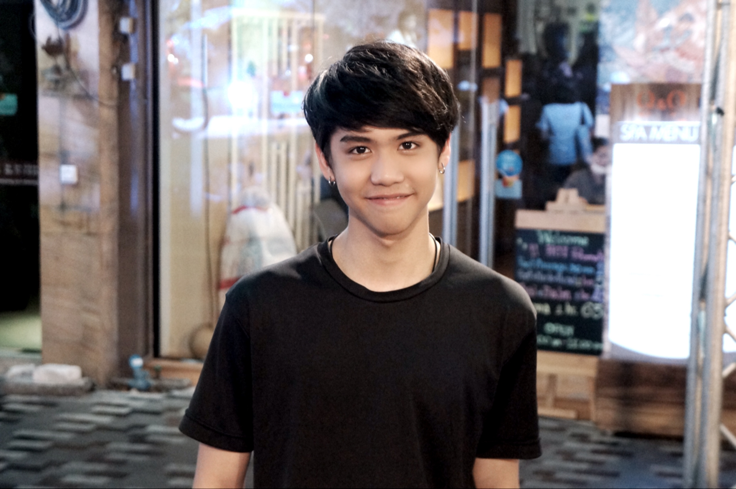 งาน รหัสโออิชิ แจกหนัก ซูโม่ทองคำ กองทัพยามาฮ่า 11 มีนาคม 2560